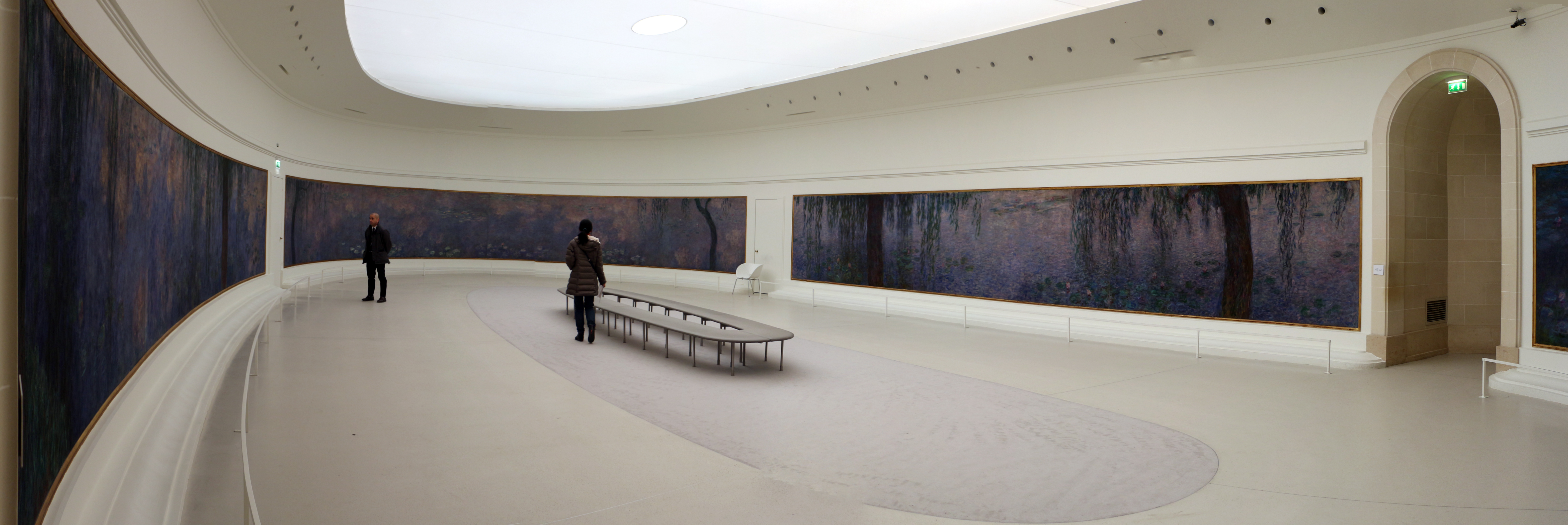 Claude monet, Ninfee e Nuvole, 1920-1926 (orangerie) 10.JPG